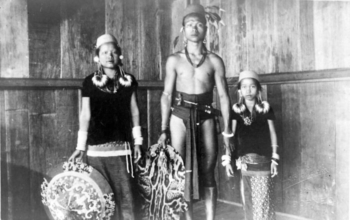 Keluarga muda Kenyah, Kalimantan Timur.